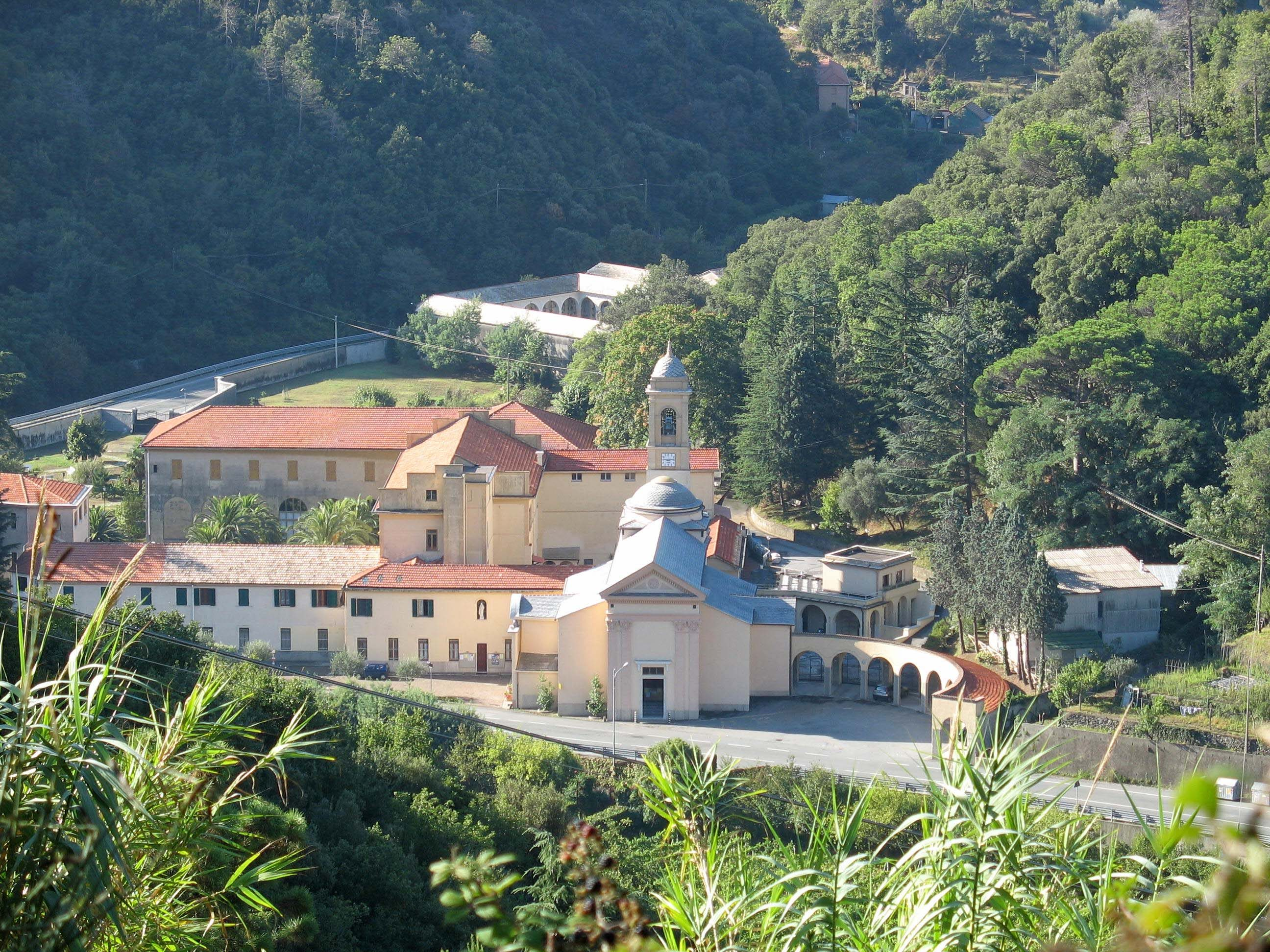 Ecco come si presenta oggi il complesso